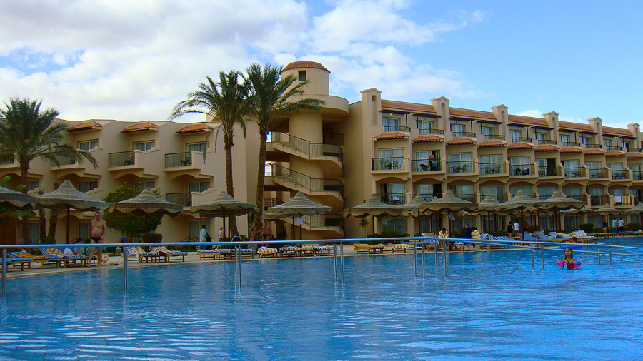 хургада